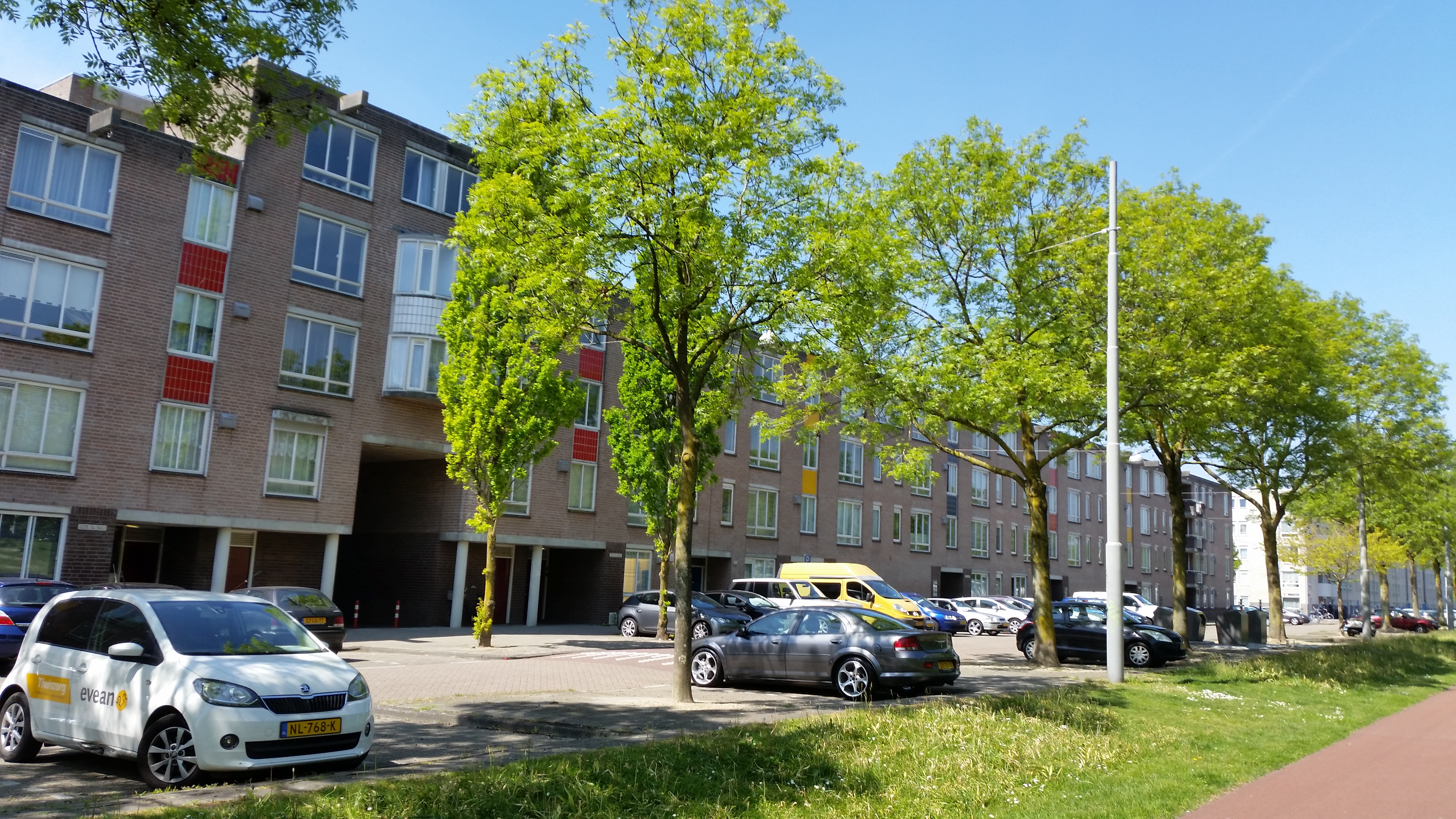 Impressie van de Bernard Shawsingel, Venserpolder, Amsterdanm Zuidoost (mei 2020)